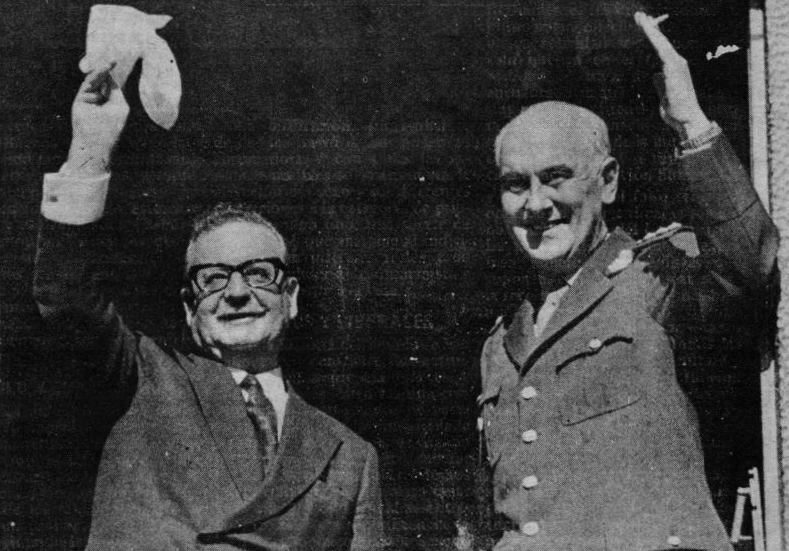 Presidente Lanusse con Allende saludan desde el balcón